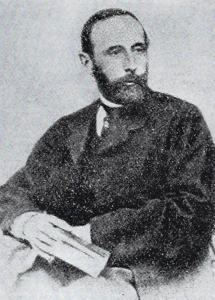 Fotografie von Josef von Lindwurm